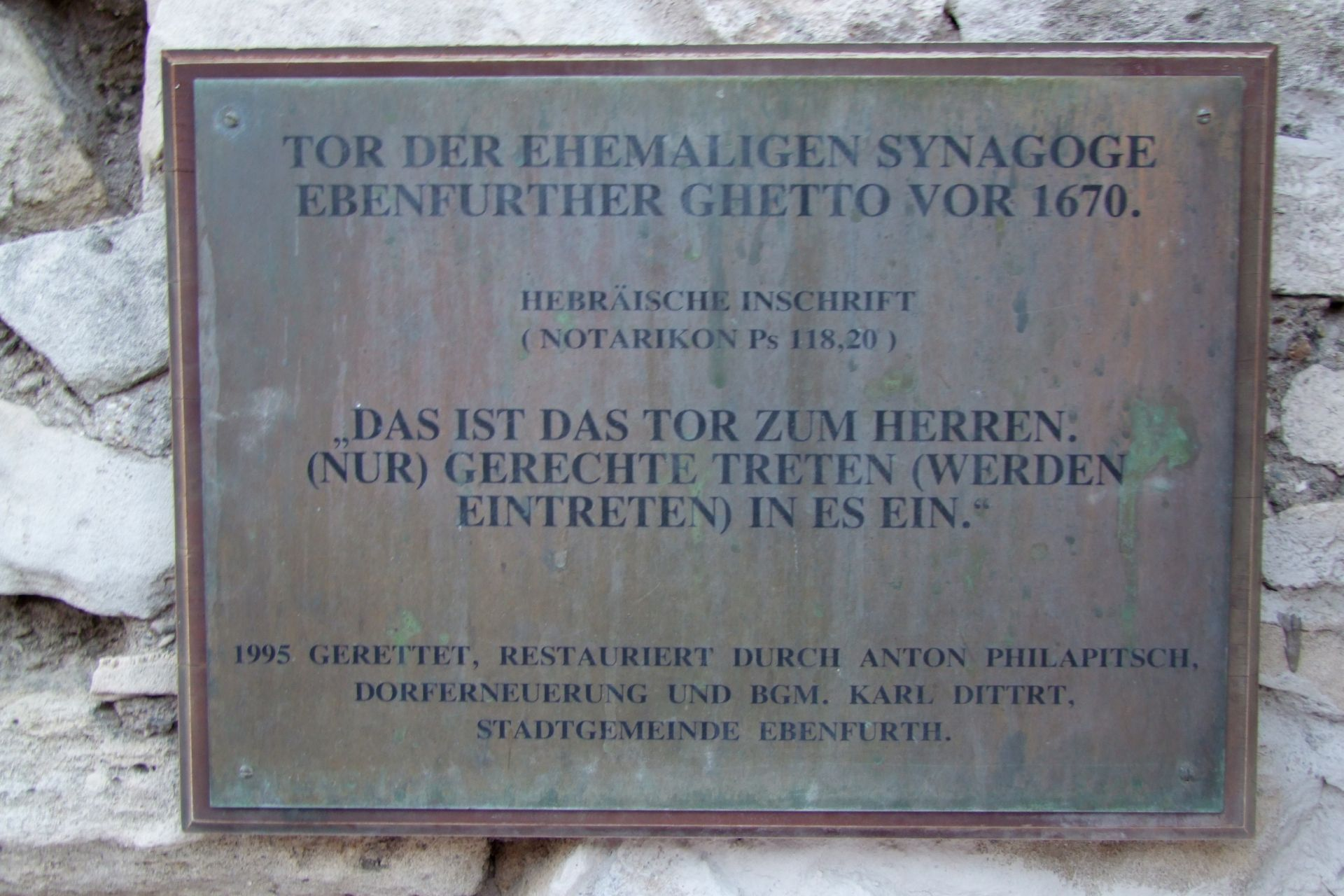 Stadtmauer (Parzellenmauer zur Straße)